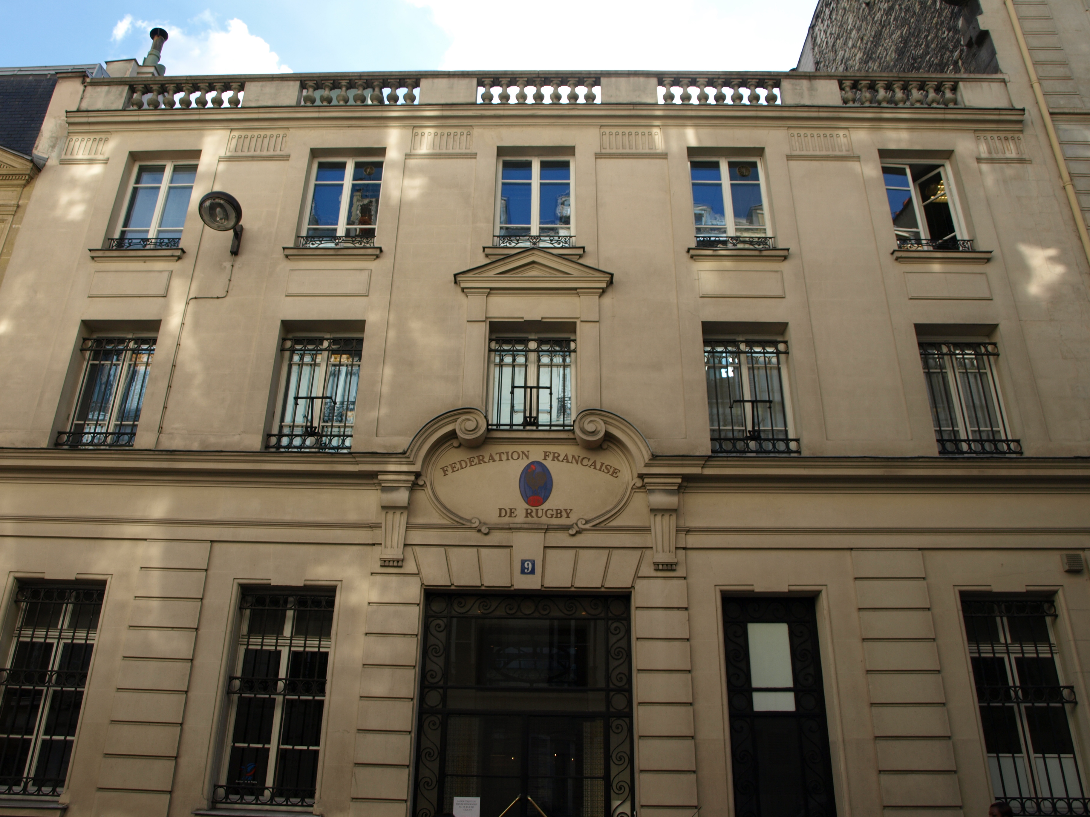 9 rue de Liège